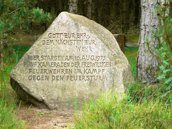 Gedenkstein am Unglücksort für die fünf getöteten Feuerwehrmänner von 1975 im Waldgebiet östlich Meinersen an der B 188 Foto aufgenommen von Benutzer Benutzer:Axel Hindemith, Juni 2005